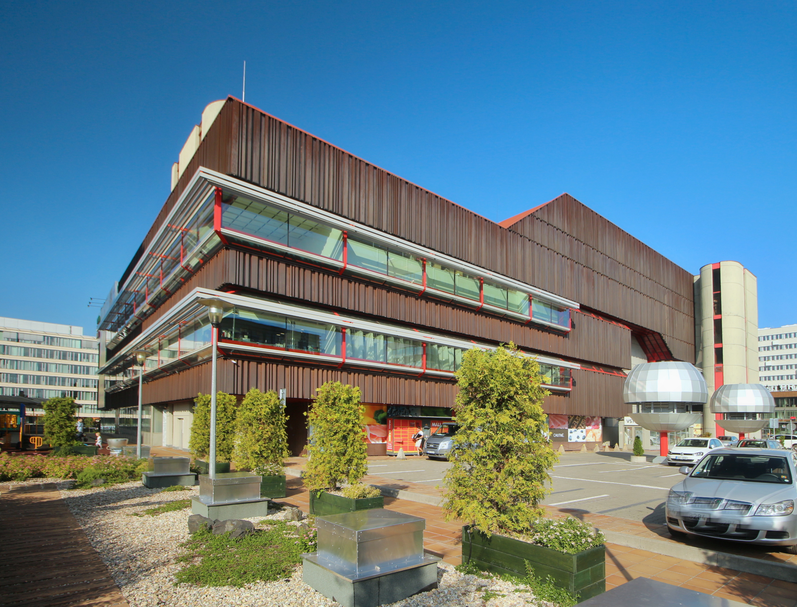 Praha, Budějovická - Dům bytové kultury